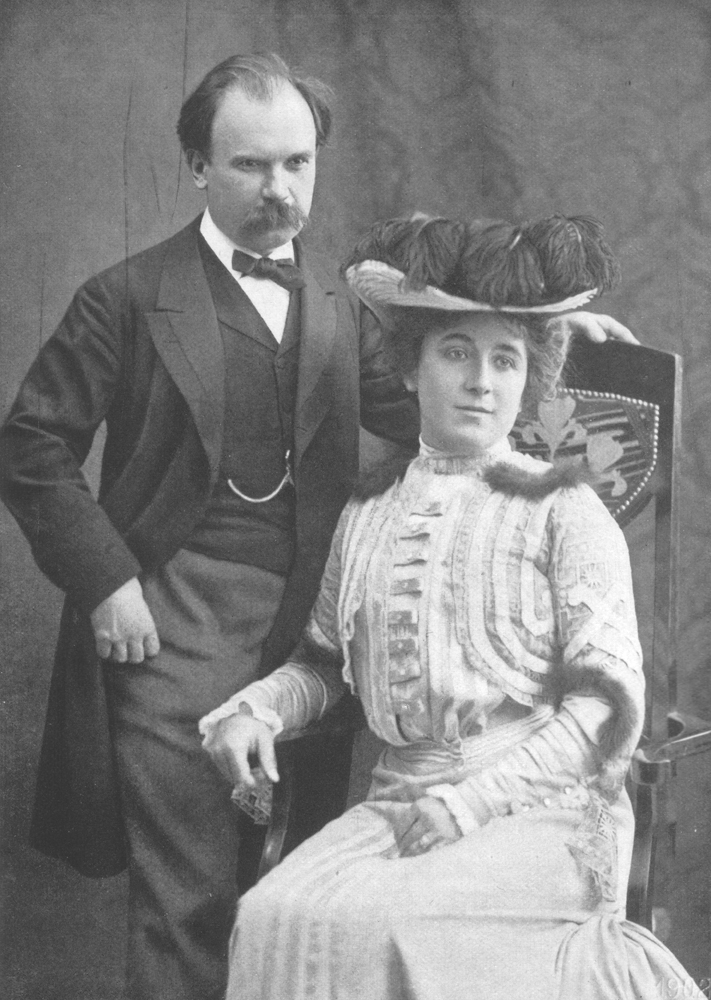 Der deutsche Komponist und Pianist Eugen d'Albert mit seiner Frau Hermine im Jahr 1902.